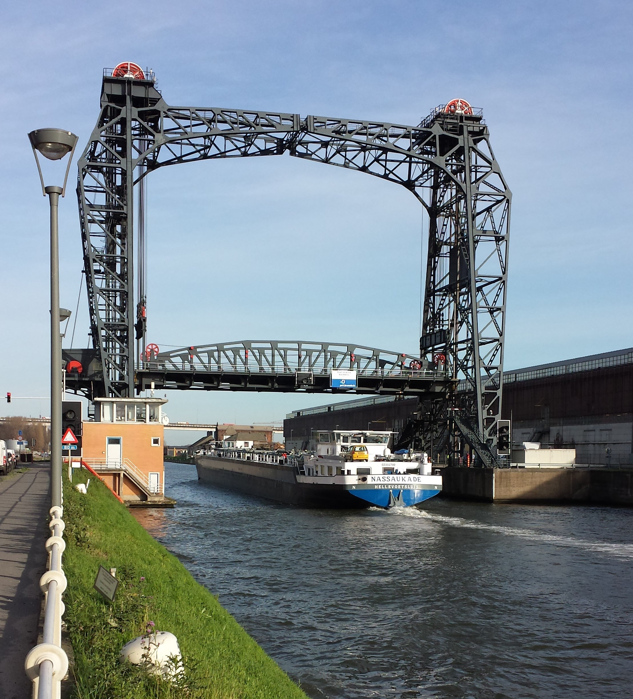 El Puente de Buda en Bruselas, alzado para permitir el paso de un barco